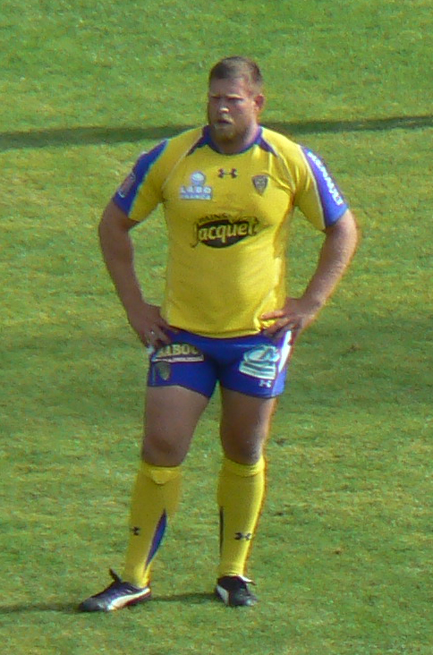 Le rugbyman belge international français Vincent Debaty affronte le CA Brive avec l'ASM Clermont Auvergne au stade Marcel Michelin de Clermont-Ferrand